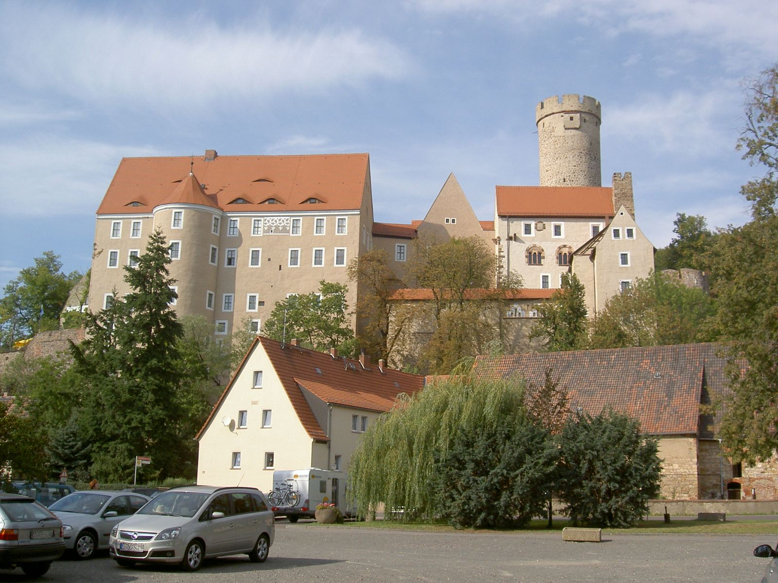 Burg Gnandstein vom Parkplatz aus fotografiert